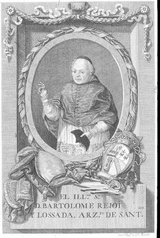 Bartolomé Rejoi y Lossada, arzobispo de Santiago. Grabado de Bartolomé Vázquez, Biblioteca Nacional de España